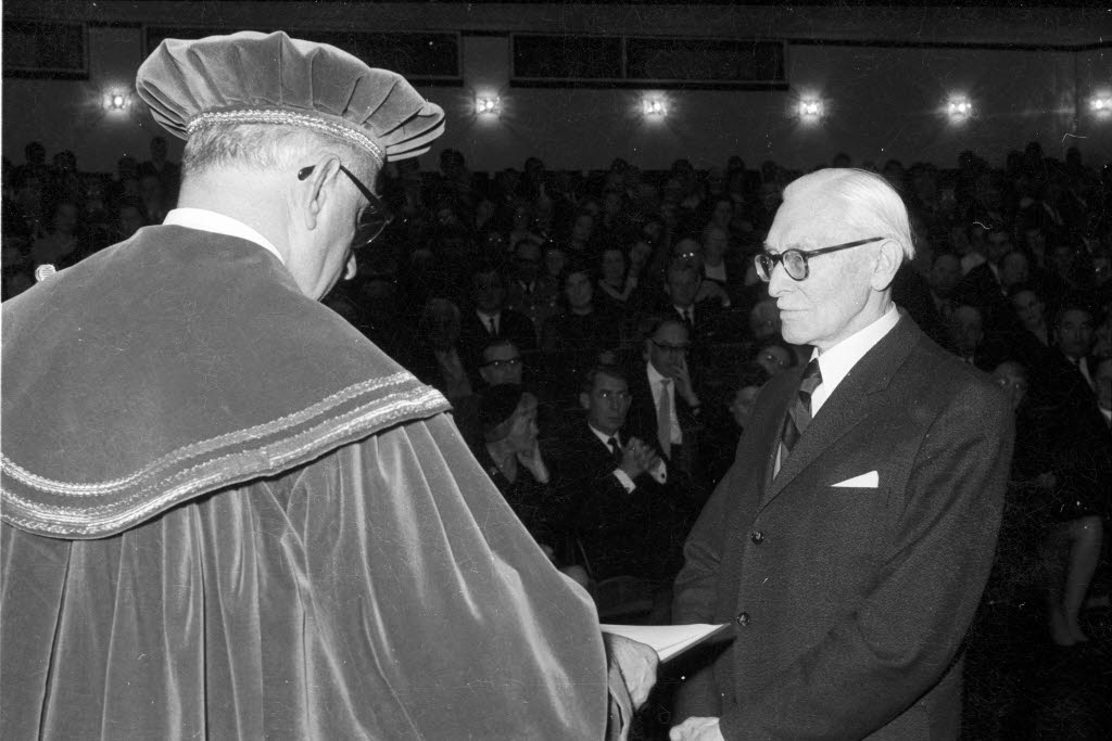 im Konzertsaal im Schloss. Im Bild Rektor Prof. Dr. Wolfgang Bargmann (links) übergibt die Verleihungsurkunde an den Numismatiker Prof. Emil Waschinski (rechts). Die Ehrungen bilden zugleich den Abschluss der Feiern zum 300jährigen Jubiläum der CAU.